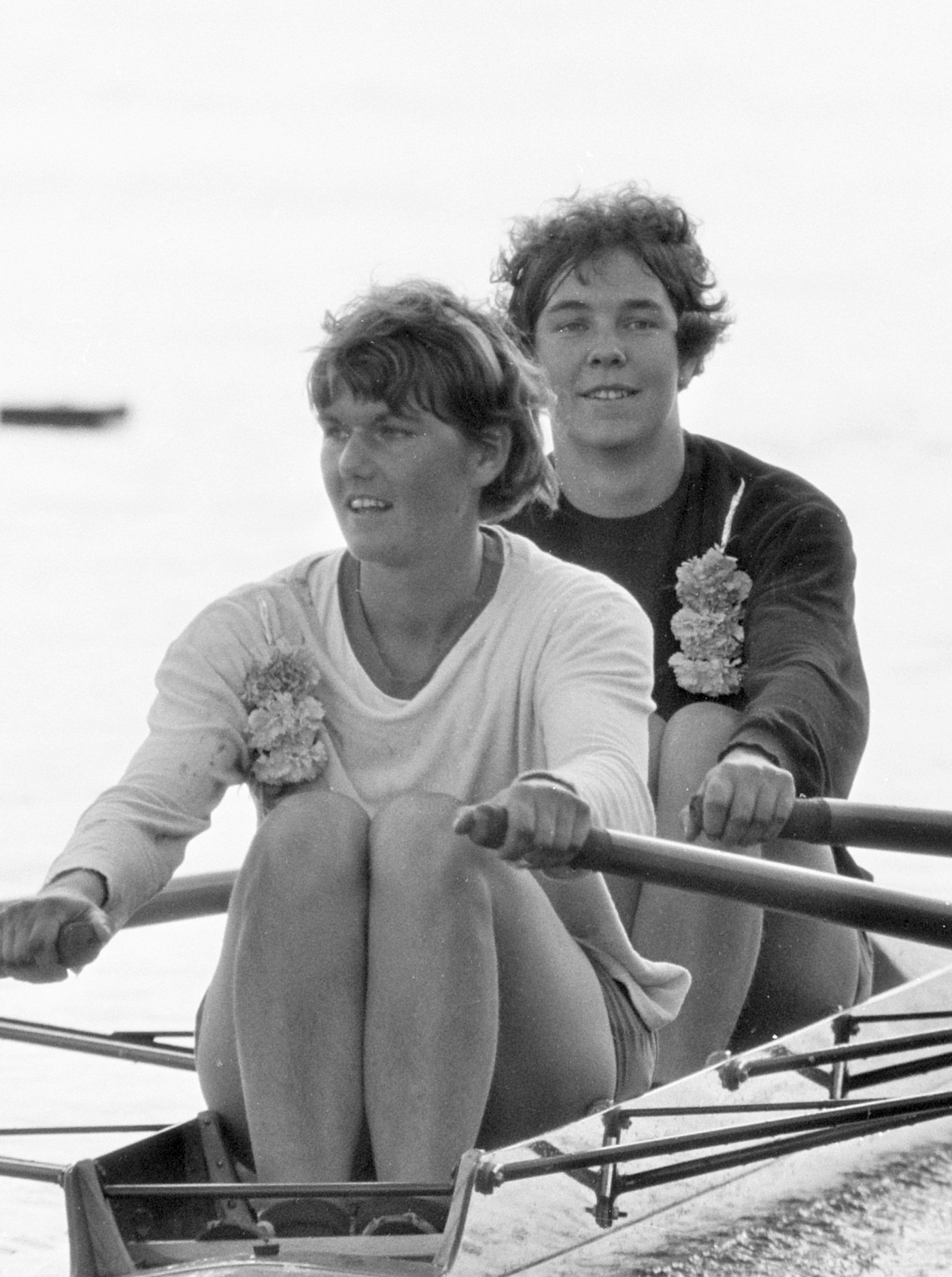 Roeien op de Bosbaan, Elite dames dubbel twee van DDS winnen. Truus Bauer en Toos van der Ende met bloemen